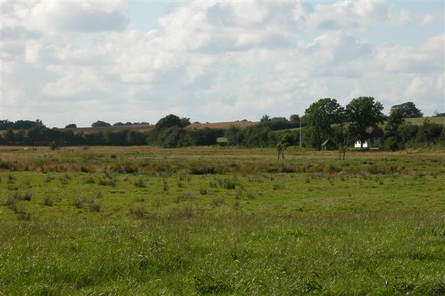 Nydam Mose, Øster Sottrup, Denmark